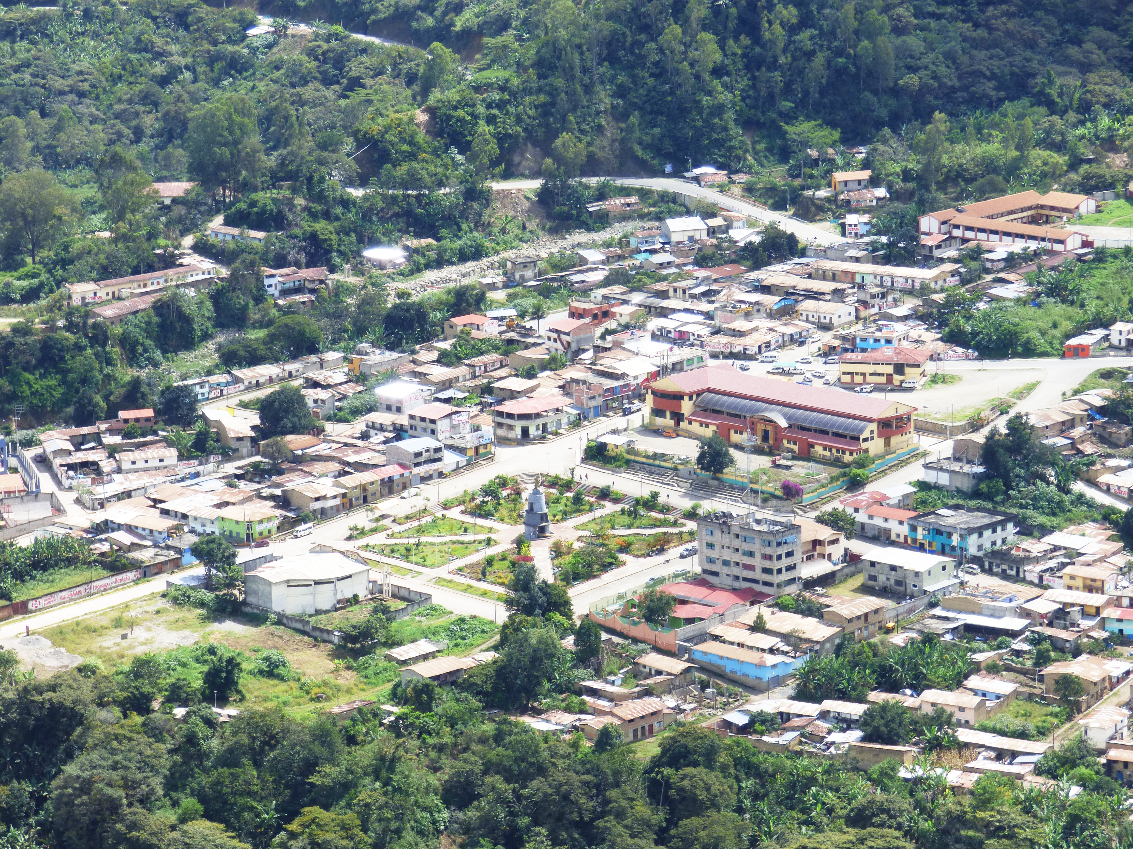 Huyro, Capital Nacional del Té Ecológico